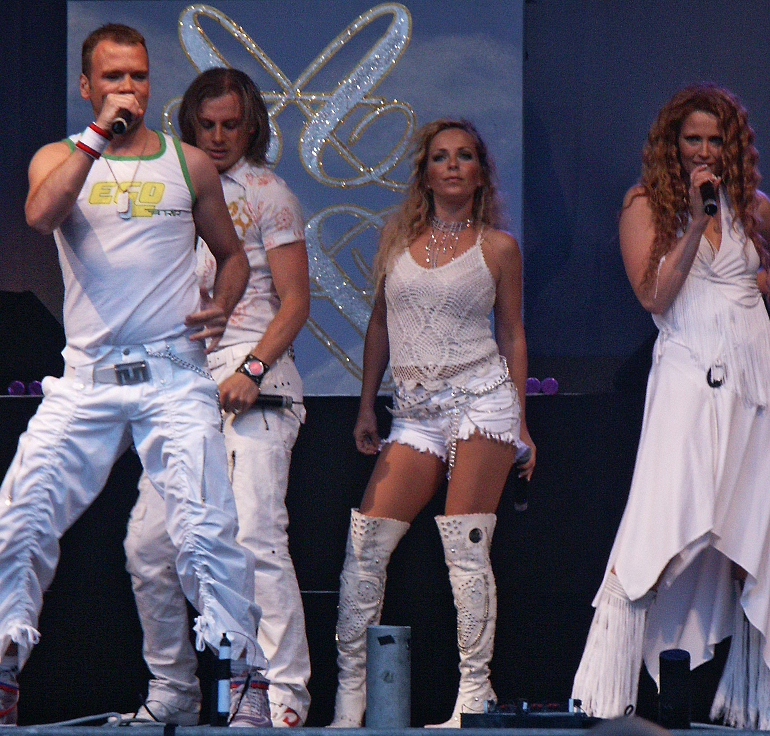 Alcazar framträder på Stora Torget i Borås